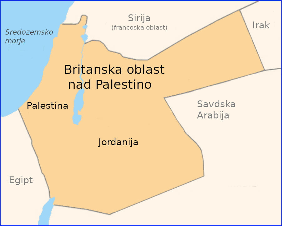 Prevedel sem vsebino prejšnje fotografije.